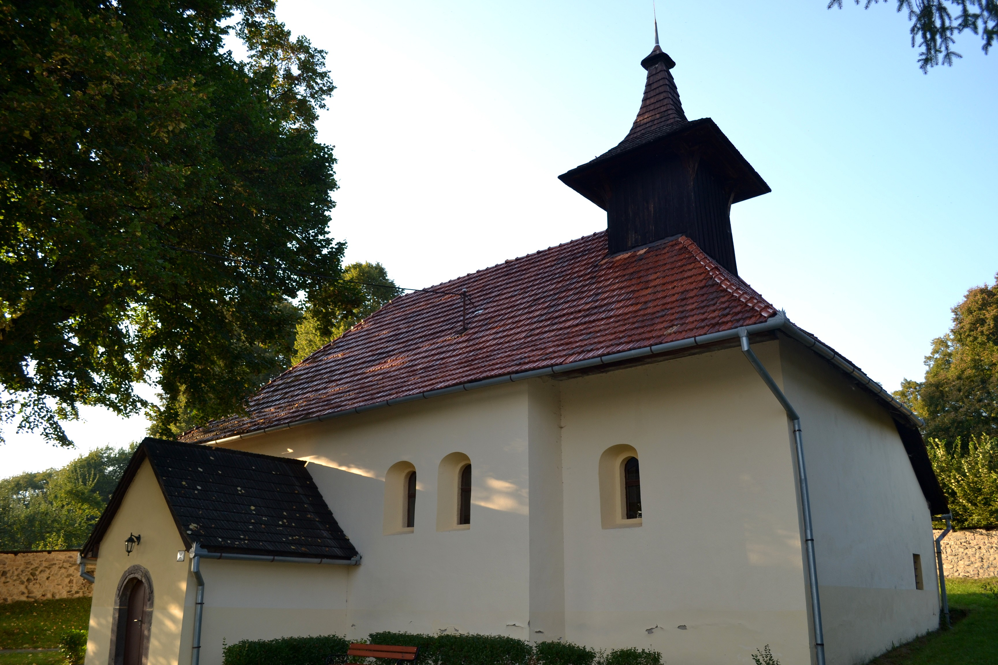 Jabloňovce (okr. Levice), evanjelický kostol; celkový pohľad